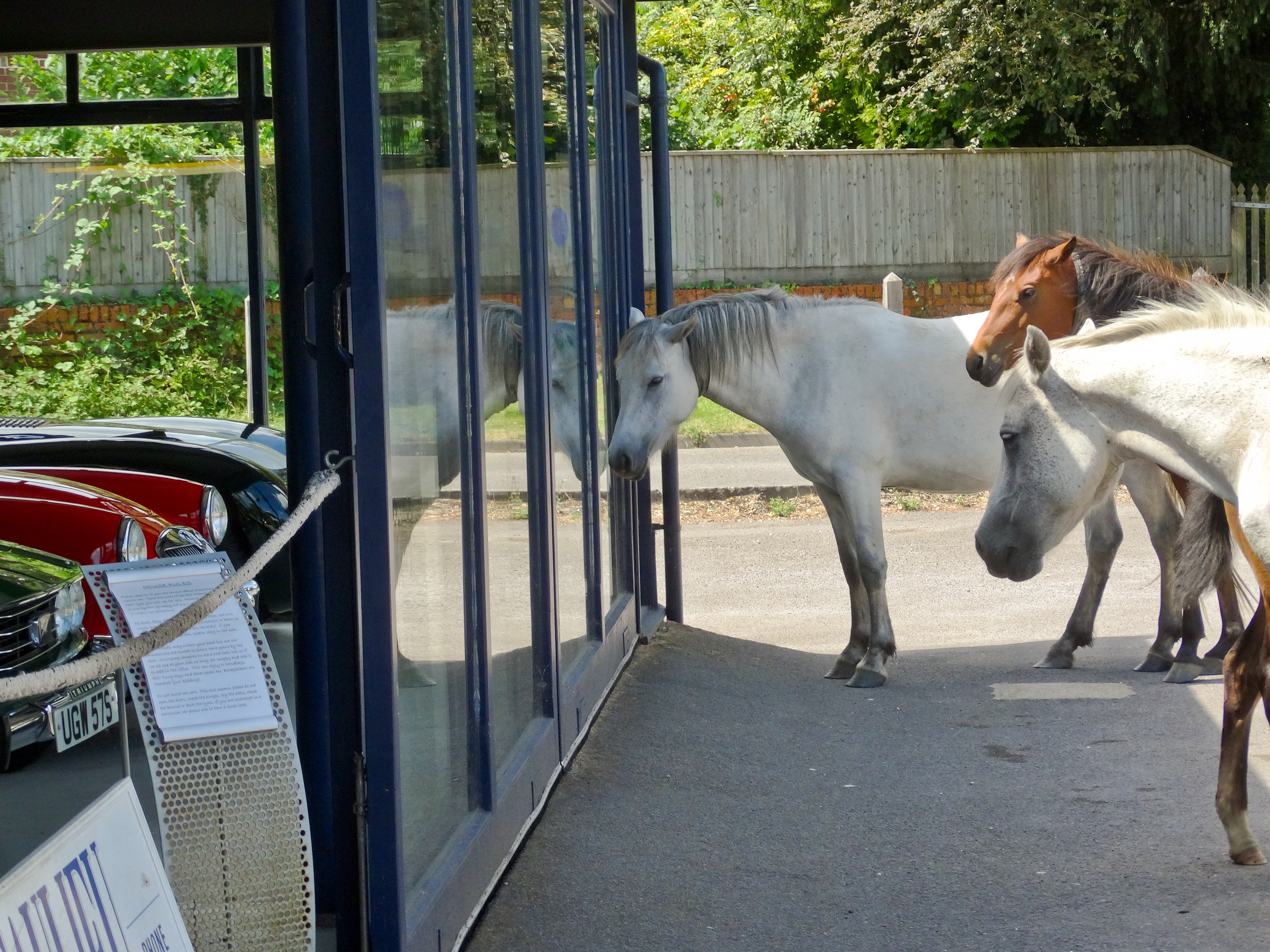 Frei lebende New Forest Ponys stehen auf dem Parkplatz eines Oldtimer-Autohauses in Beaulieu